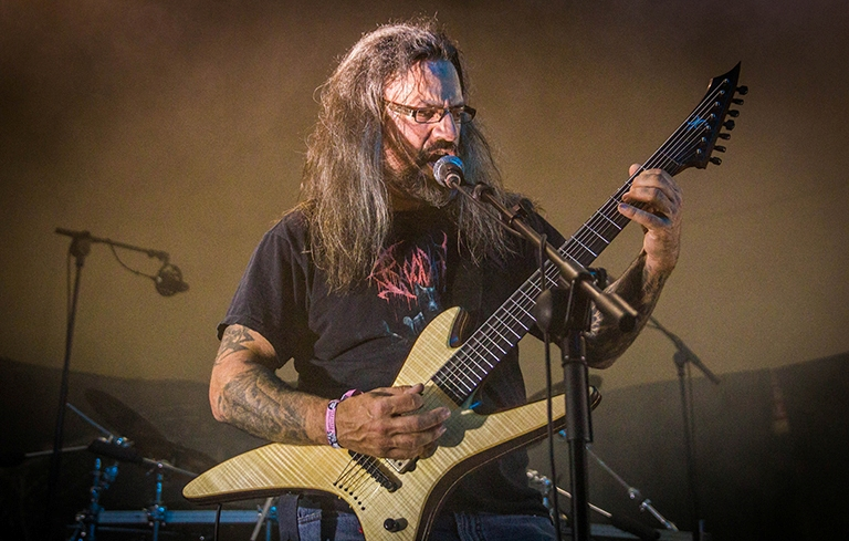 Luc Lemay, de Gorguts, en directo en Madrid (2014)